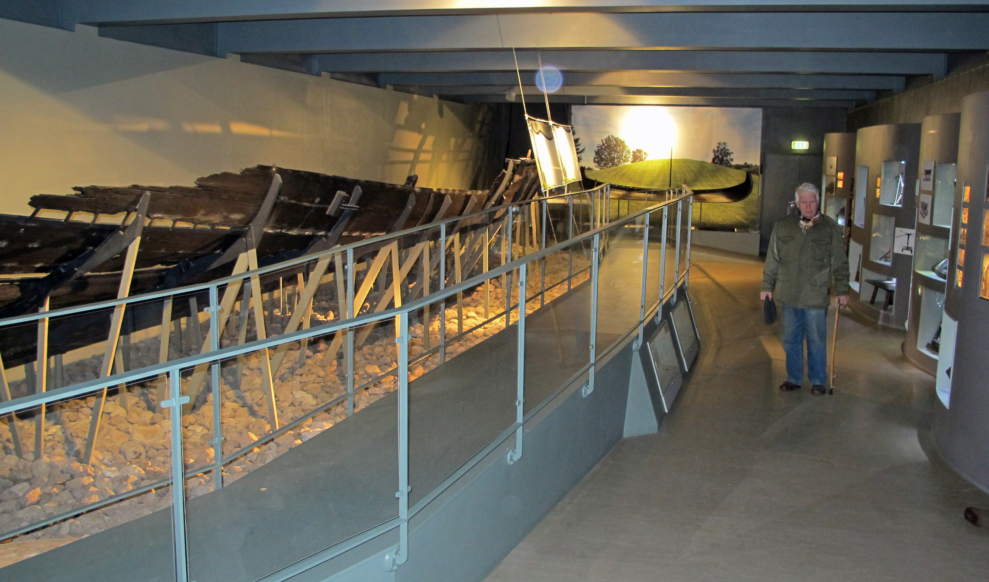 Utstillingen av Klåstadskipet i Slottsfjellmuseet med Arne Emil Christensen